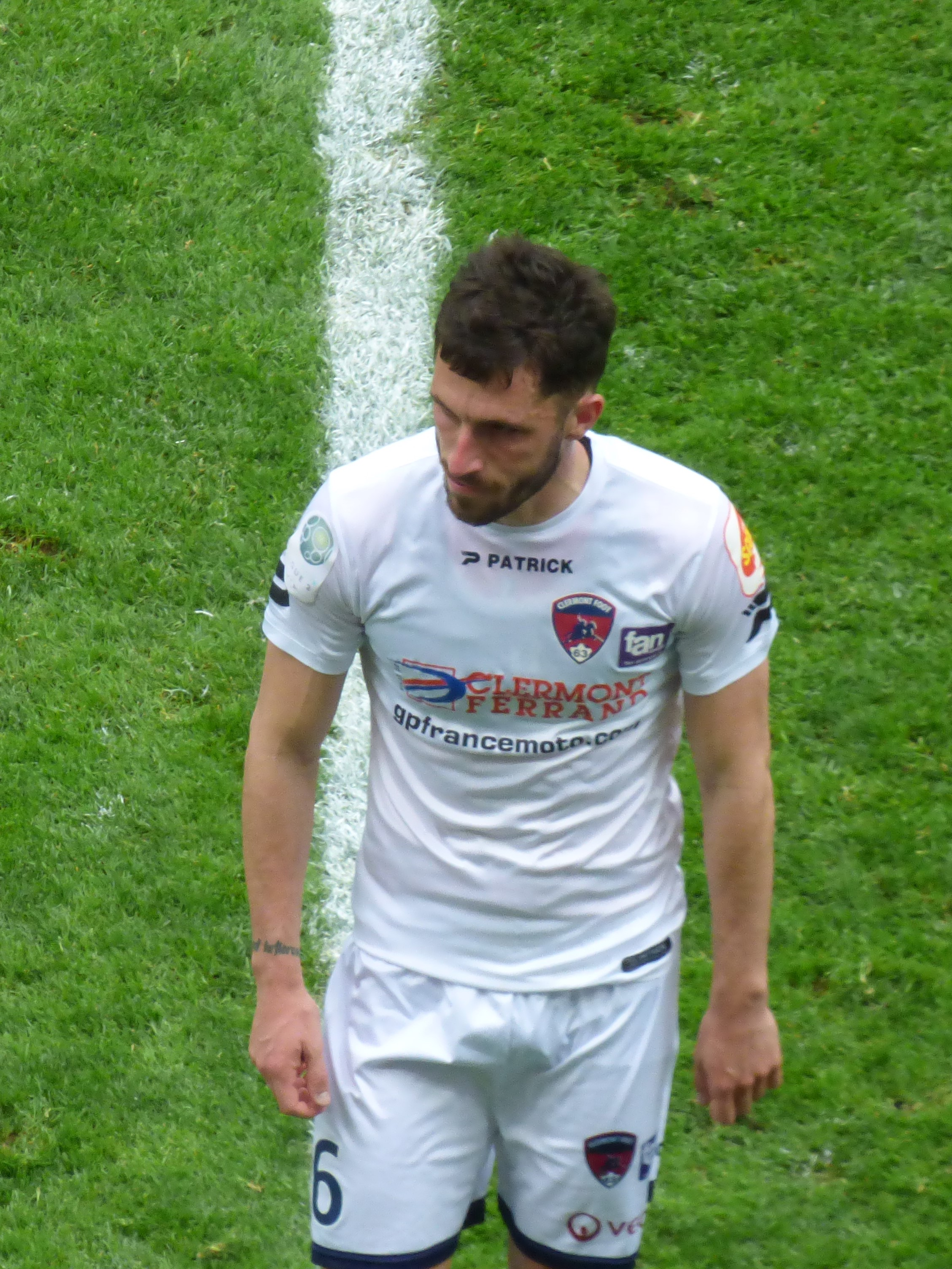 Jason Berthomier après le match RC Lens / Clermont Foot 63, comptant pour la 36ème journée du championnat de France de football de Ligue 2 2018-2019, le 4 mai 2019, au stade Bollaert-Delelis.